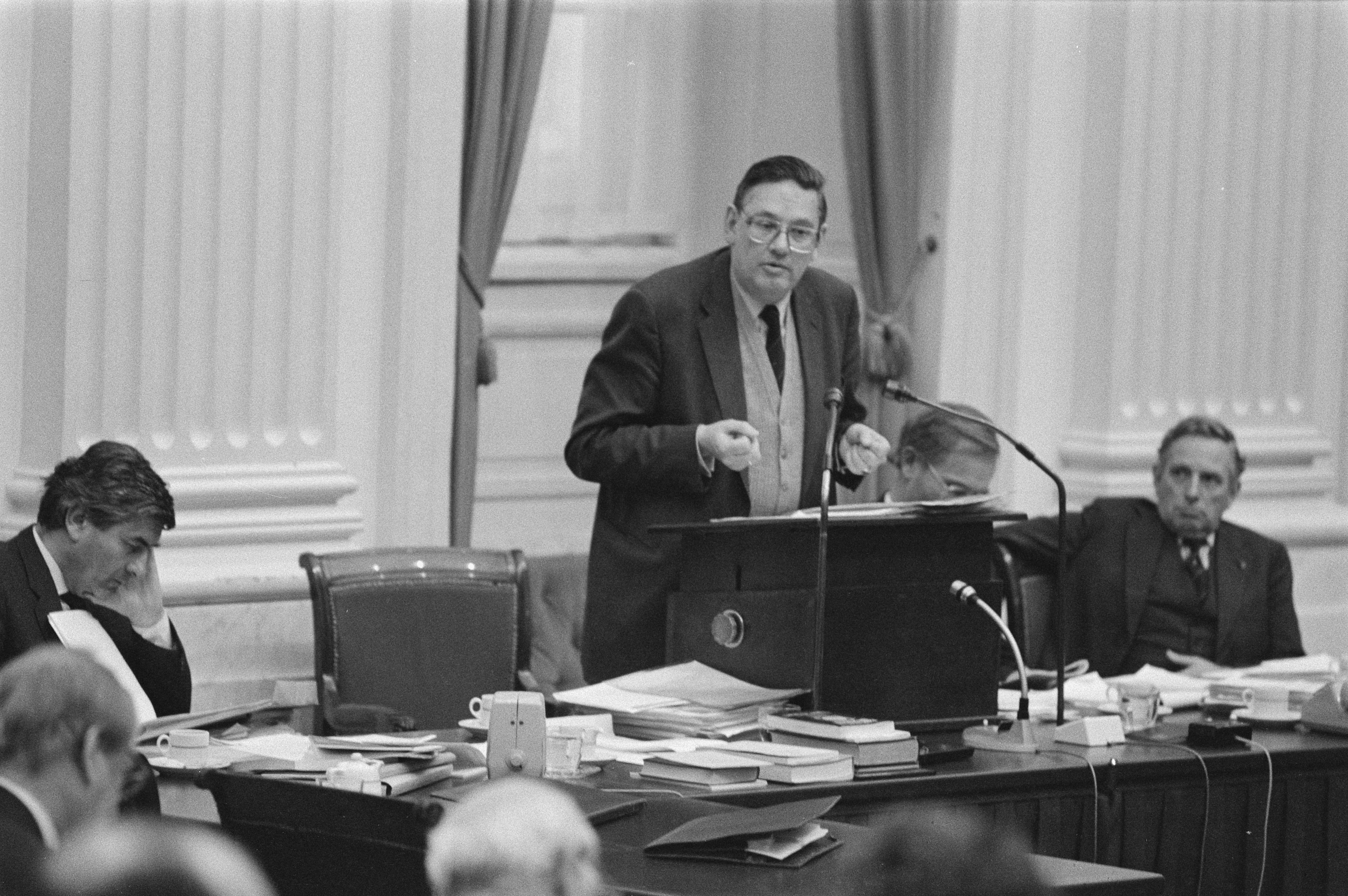 Collectie / Archief : Fotocollectie Anefo Reportage / Serie : [ onbekend ] Beschrijving : Tweede Kamer debatteert met regering over rapport RSV enquetecommissie; minister Van Aardenne aan het woord Datum : 28 februari 1985 Trefwoorden : RAPPORTEN, enquete-commissies Persoonsnaam : Aardenne, Gijs van Fotograaf : Bogaerts, Rob / Anefo Auteursrechthebbende : Nationaal Archief Materiaalsoort : Negatief (zwart/wit) Nummer archiefinventaris : bekijk toegang 2.24.01.05 Bestanddeelnummer : 933-2523